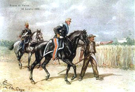 Cavalieri del Reggimento Lancieri di Firenze sul campo di battaglia di Ponte Versa (Gorizia) del 26 luglio 1866 durante la terza guerra d'indipendenza italiana